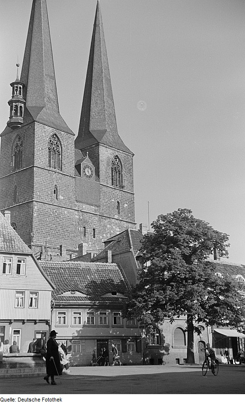 Original image description from the Deutsche Fotothek Ansicht Nikolaikirche